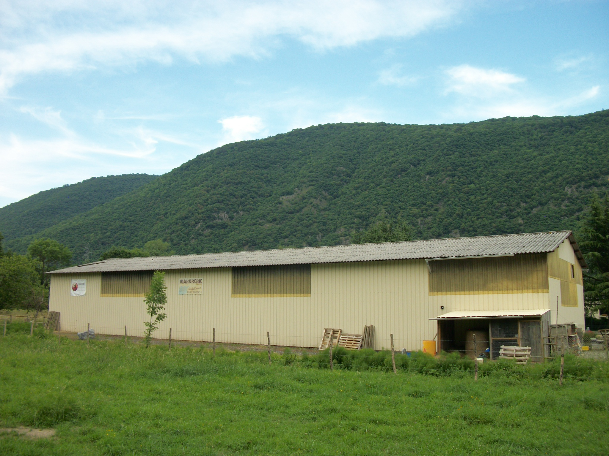 Bertren